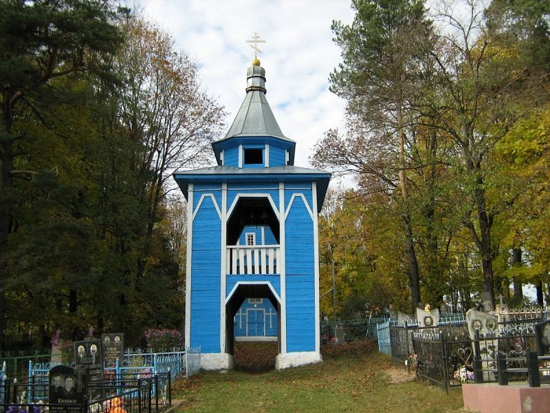 Галынка. Царква